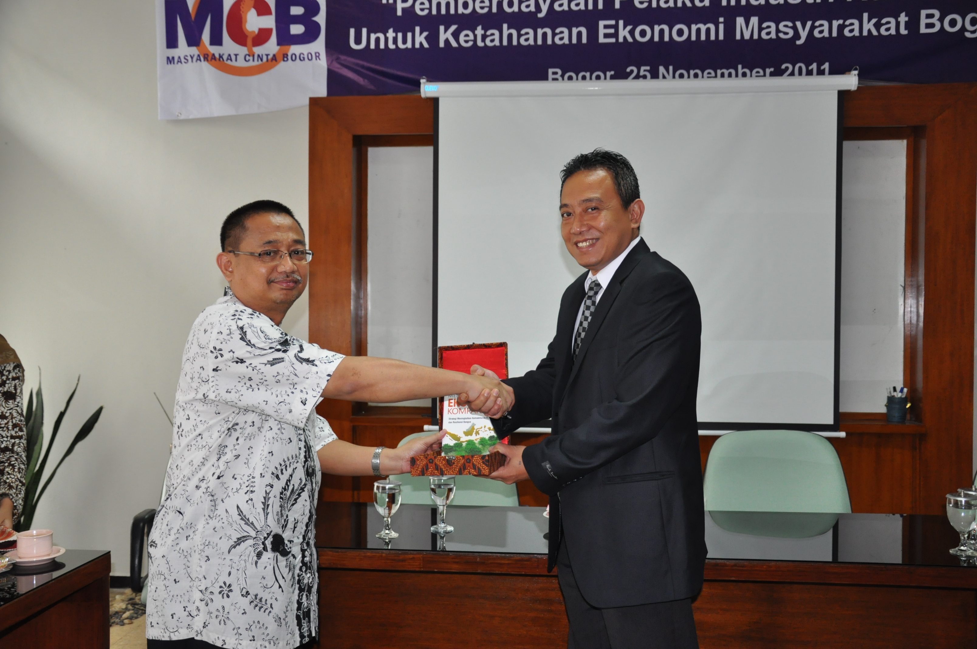 Bagus Karyanegara IPB